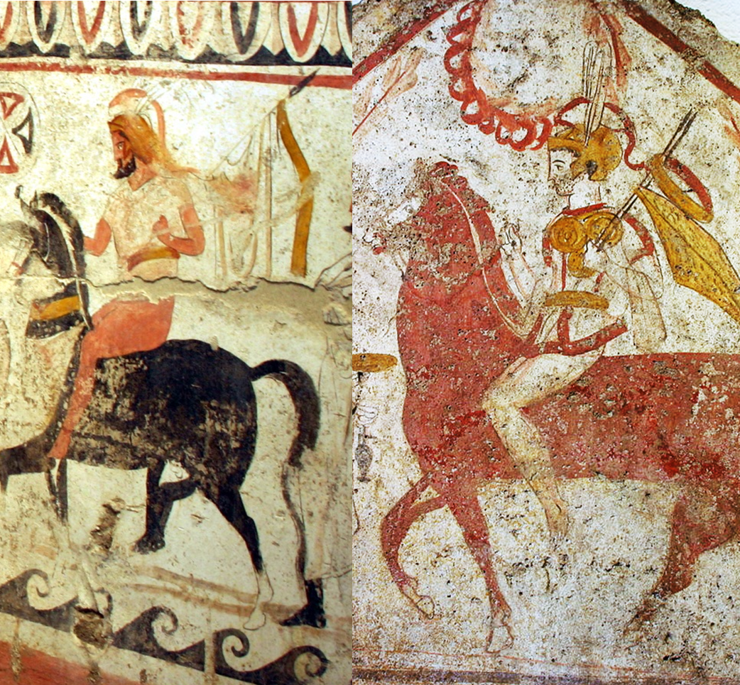 Tomba lucana Paestum IV sec. a.C. Immagini già presenti su Commons: 1; 2